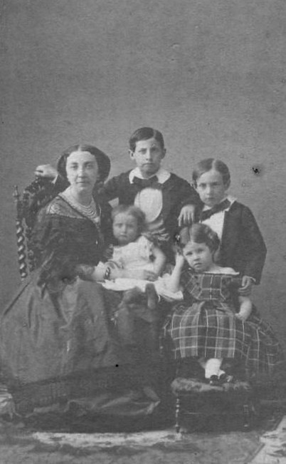 Графиня Луиза Бенкендорф, урож. де Круа (1825—1890) с детьми.